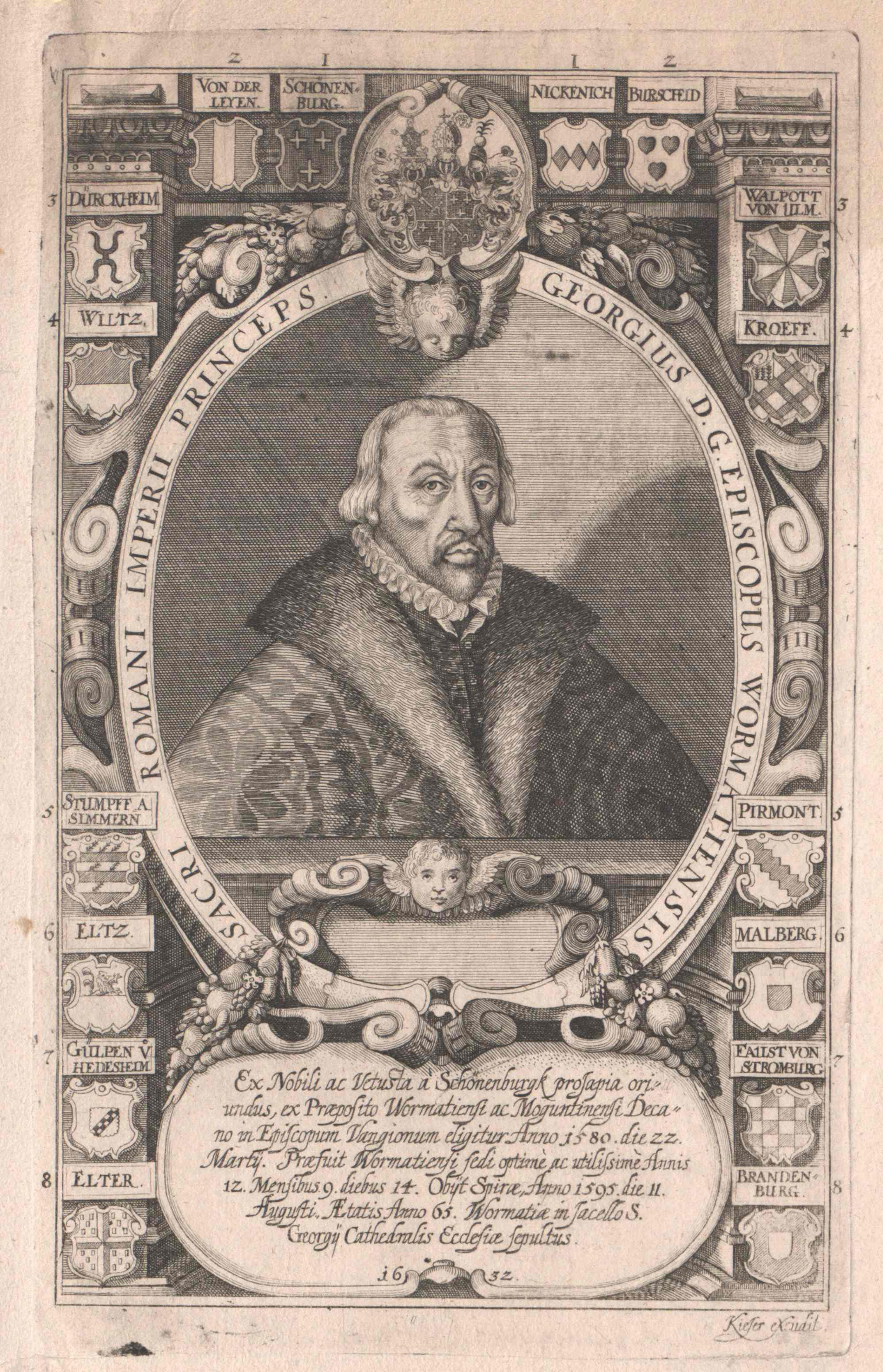 Georg von Schönenberg bzw. Schönenburg, Bischof von Worms; Wien, Österreichische Nationalbibliothek, Bildarchiv und Grafiksammlung, Porträtsammlung, Inventar-Nr. PORT_00080733_01